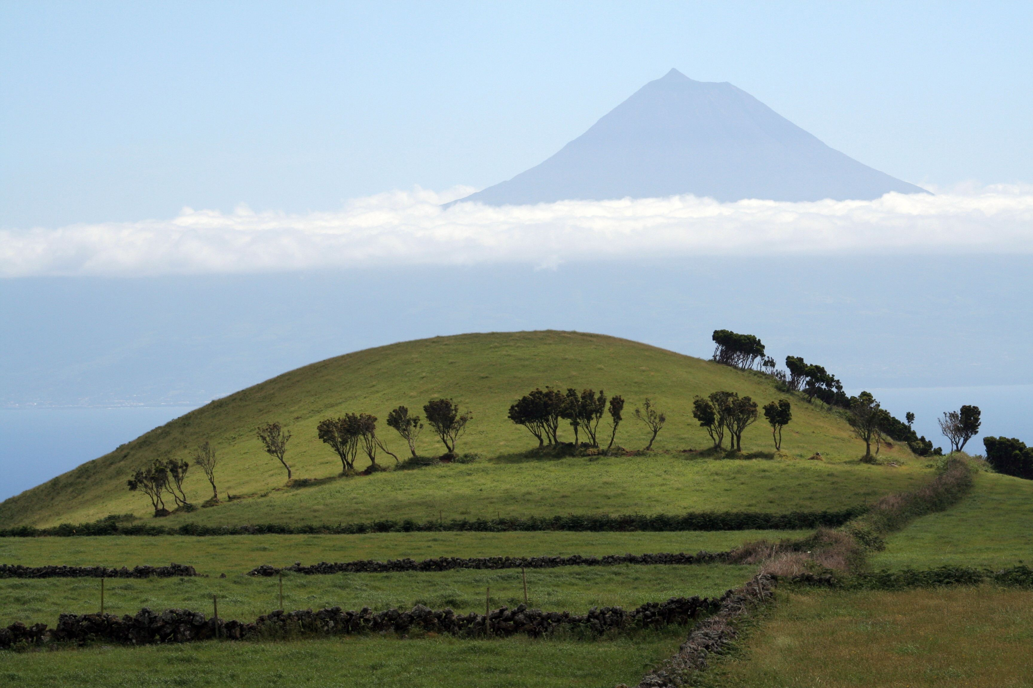 Pico, von São Jorge gesehen, Azoren